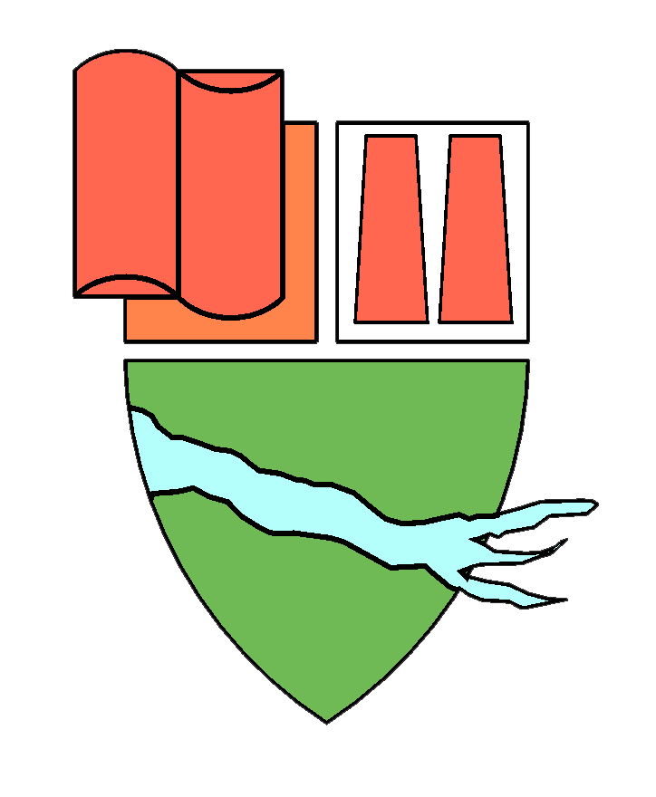 Blason de Pargny-sur-Saulx, Marne, créé avec Photoshop